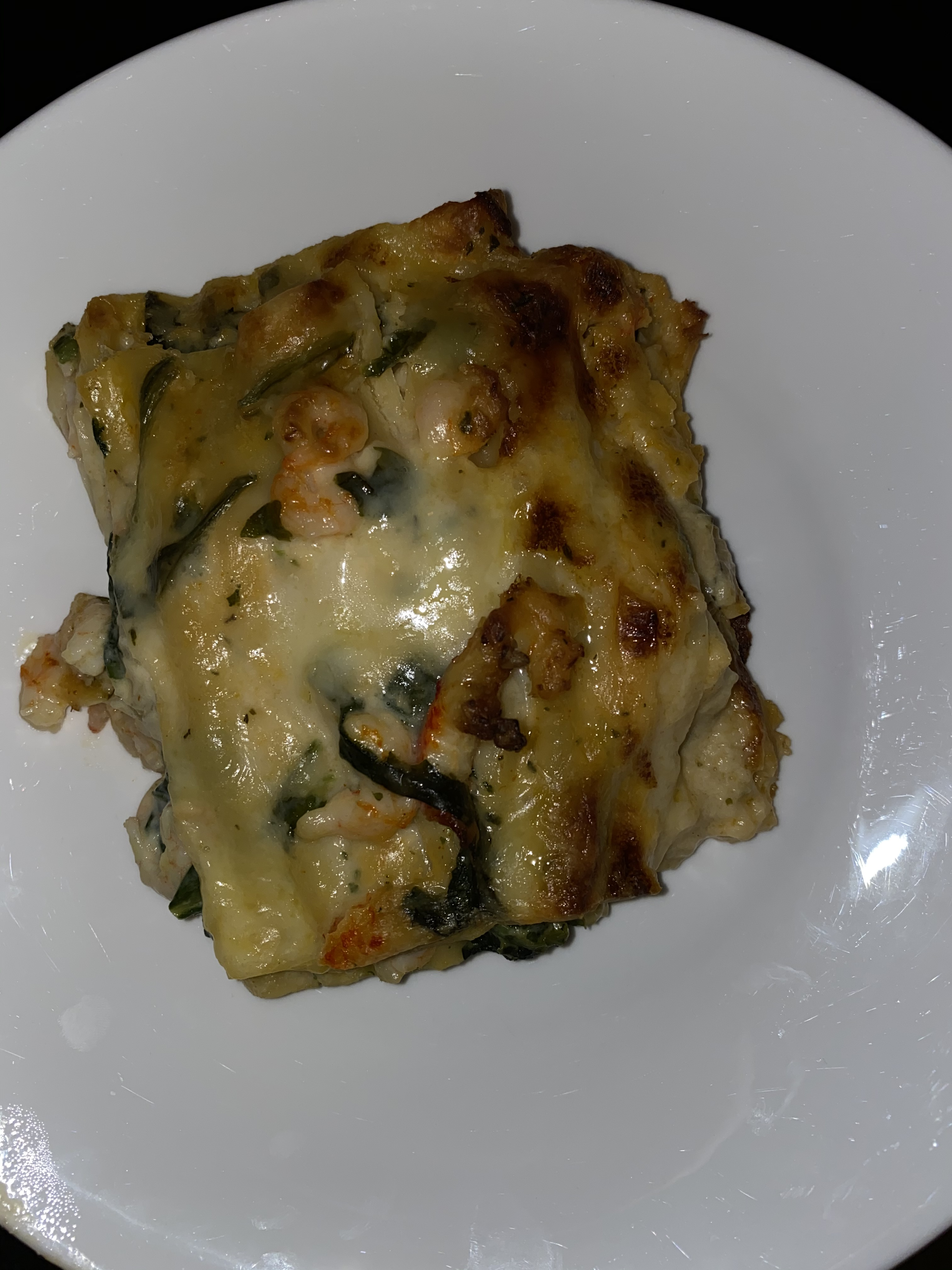 Huvudinnehåll Skaldjur Severas som Huvudrätt Serveringstemperatur Varm